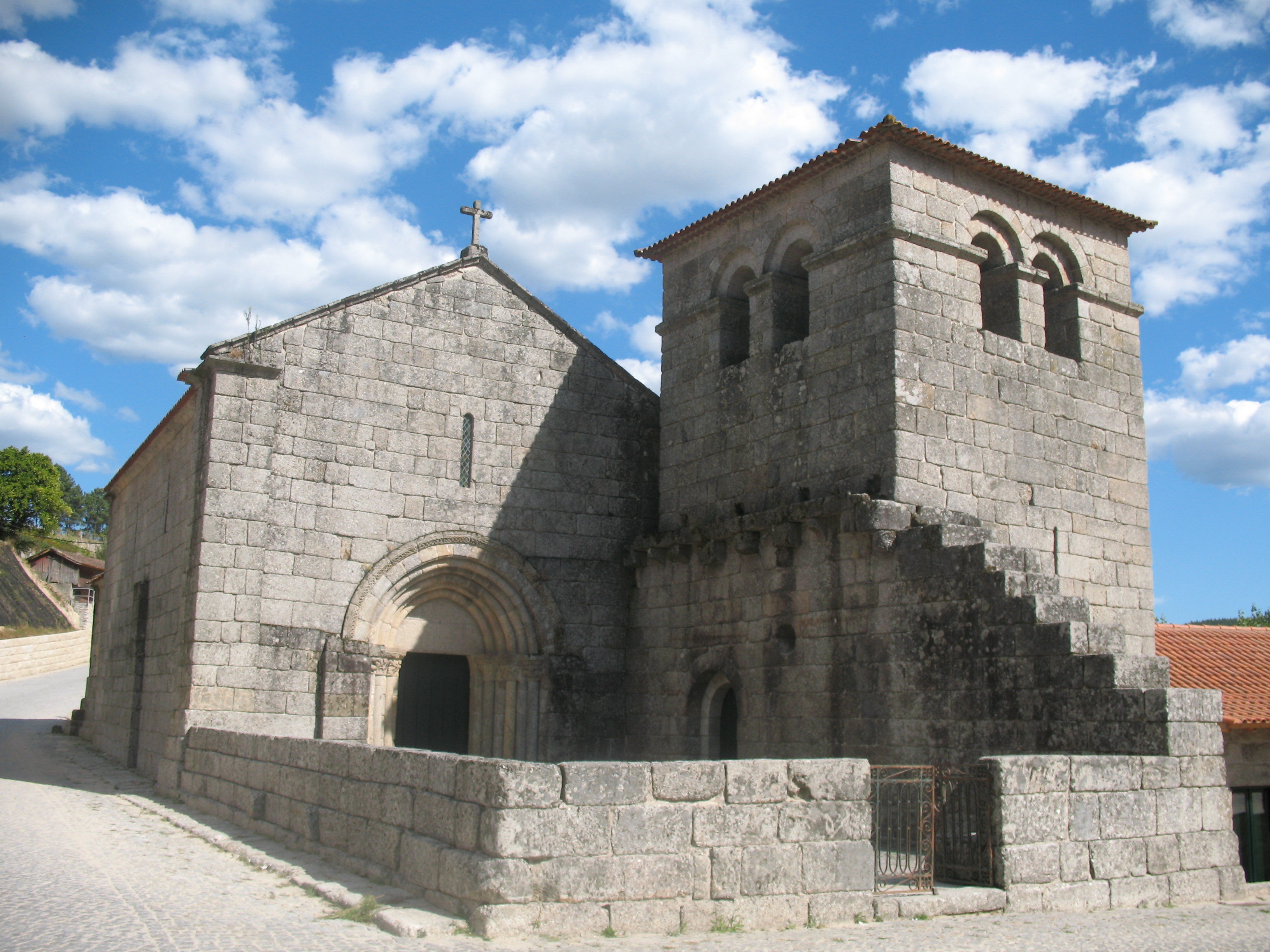 Amarante Igreja Românica de Freixo de Baixo